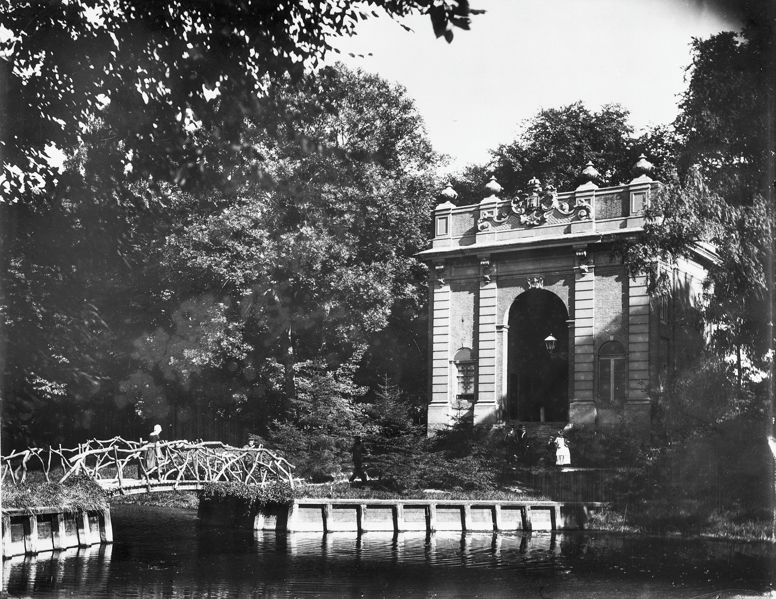 Koepoort: Koepoort, veldzijde